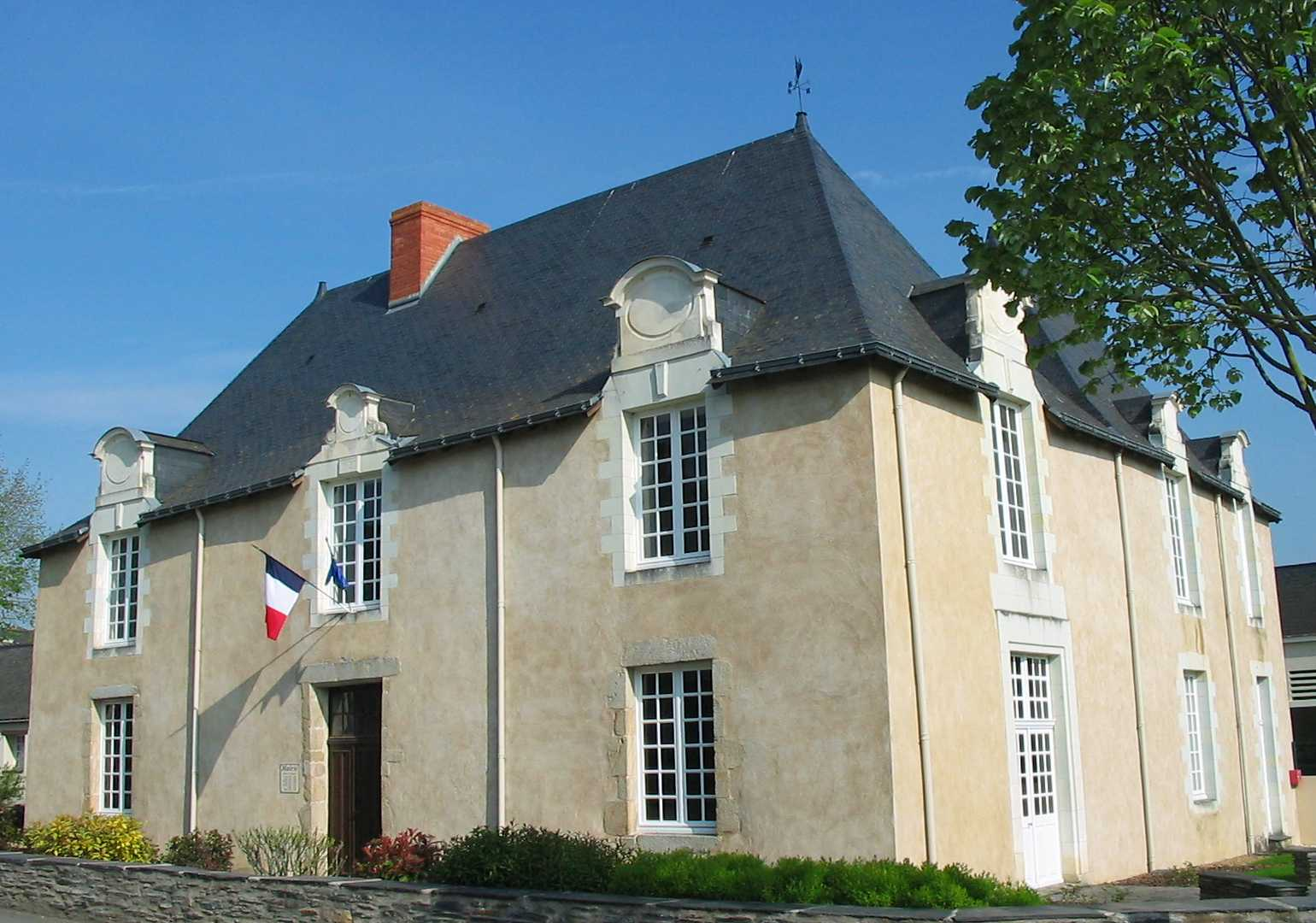 l'ancienne cure devenue mairie, à la Pouëze (49)